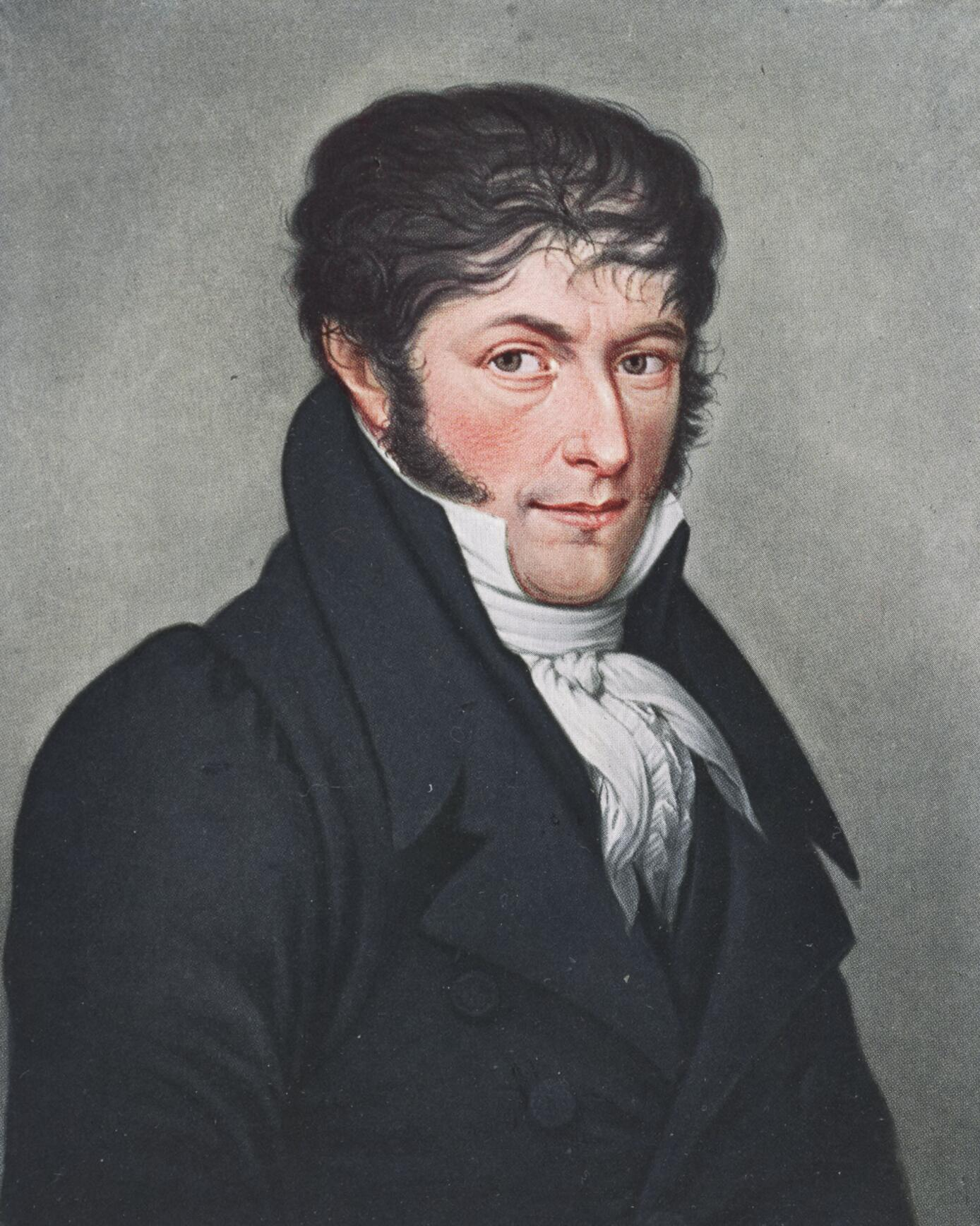 Fragment van een portret van Arnold Hendrik Koning (1784-1850)